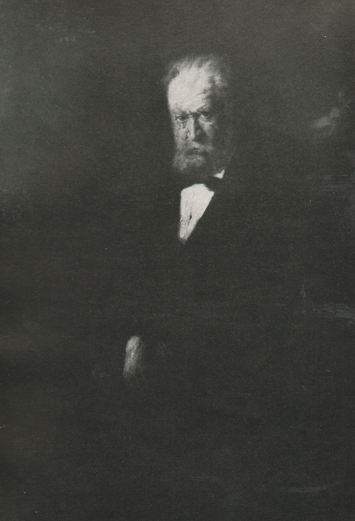 Portretul lui Gheorghe Panaiteanu-Bardasare, realizat de Octav Băncilă. Fotografia alb/negru a tabloului.